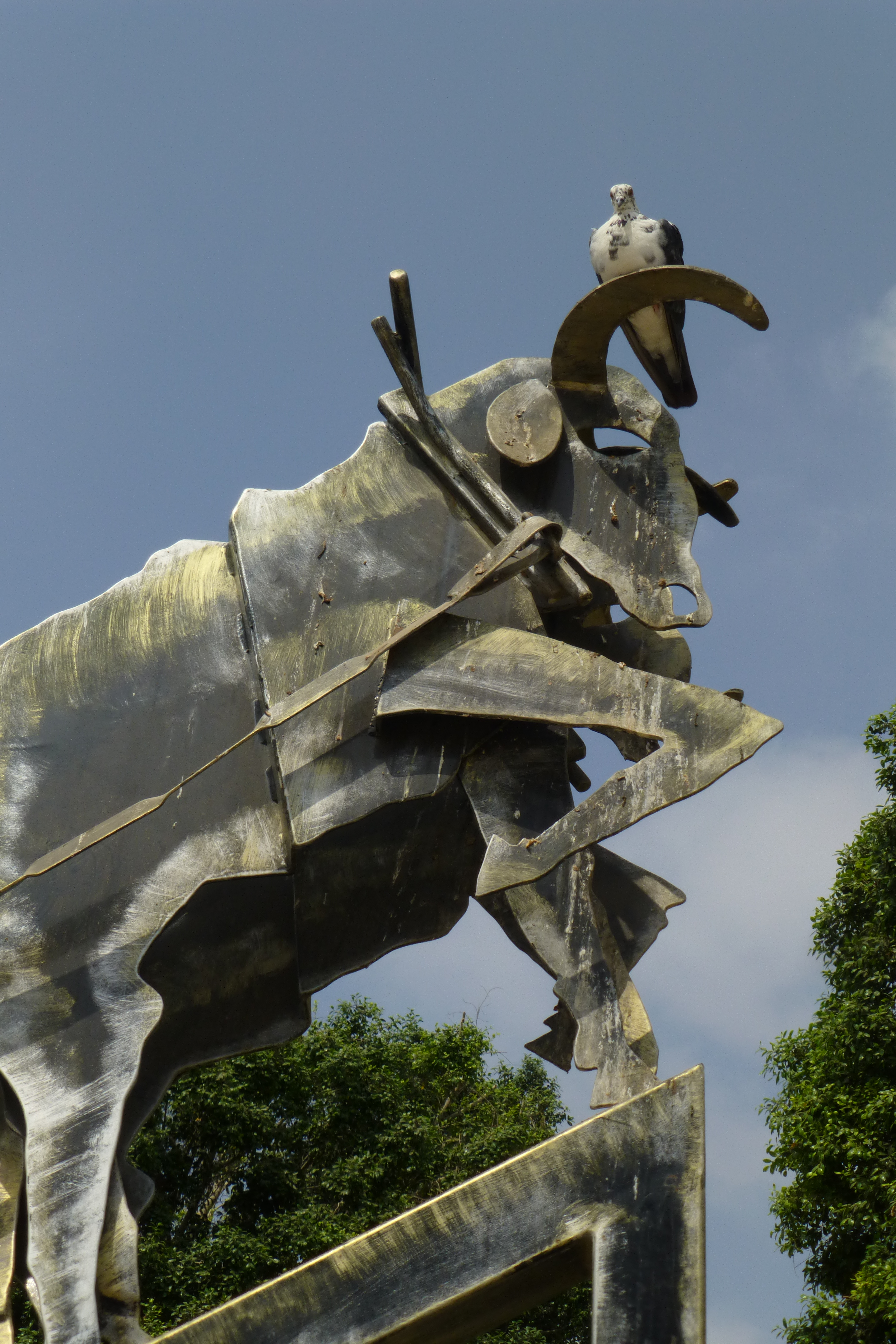 כיכר המייסדים, כיכר מרכזית בפתח תקווה, שוכנת במיקום הבתים הראשונים שנבנו בפתח תקווה בשנת 1878. כבר בימי העלייה השנייה שימשה כמקום מפגש ובילויים.